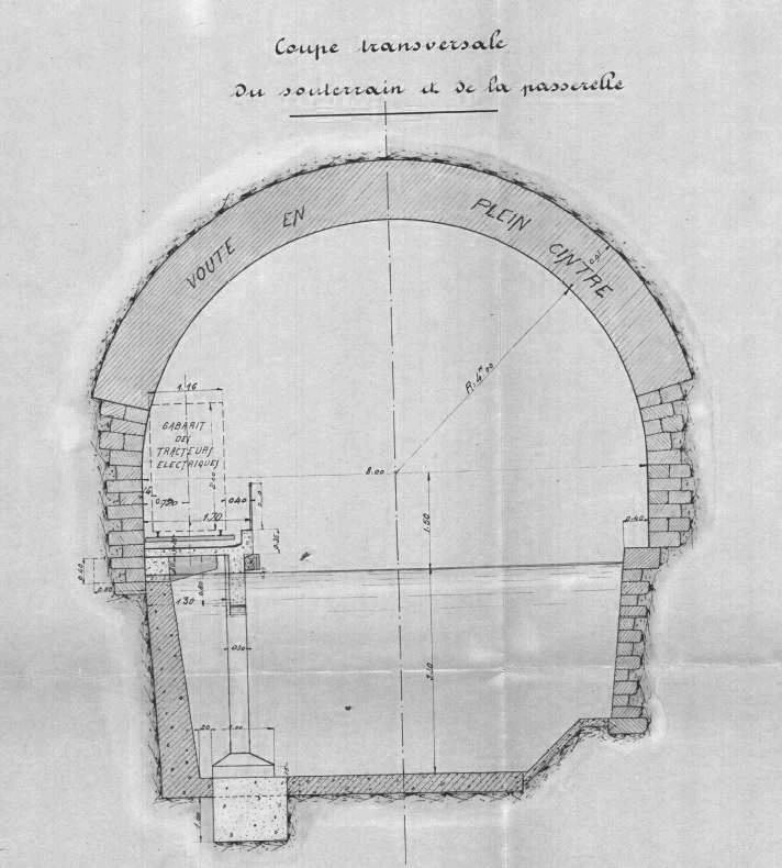 Coupe de la vôute de Liverdun parue dans la revue science et industrie